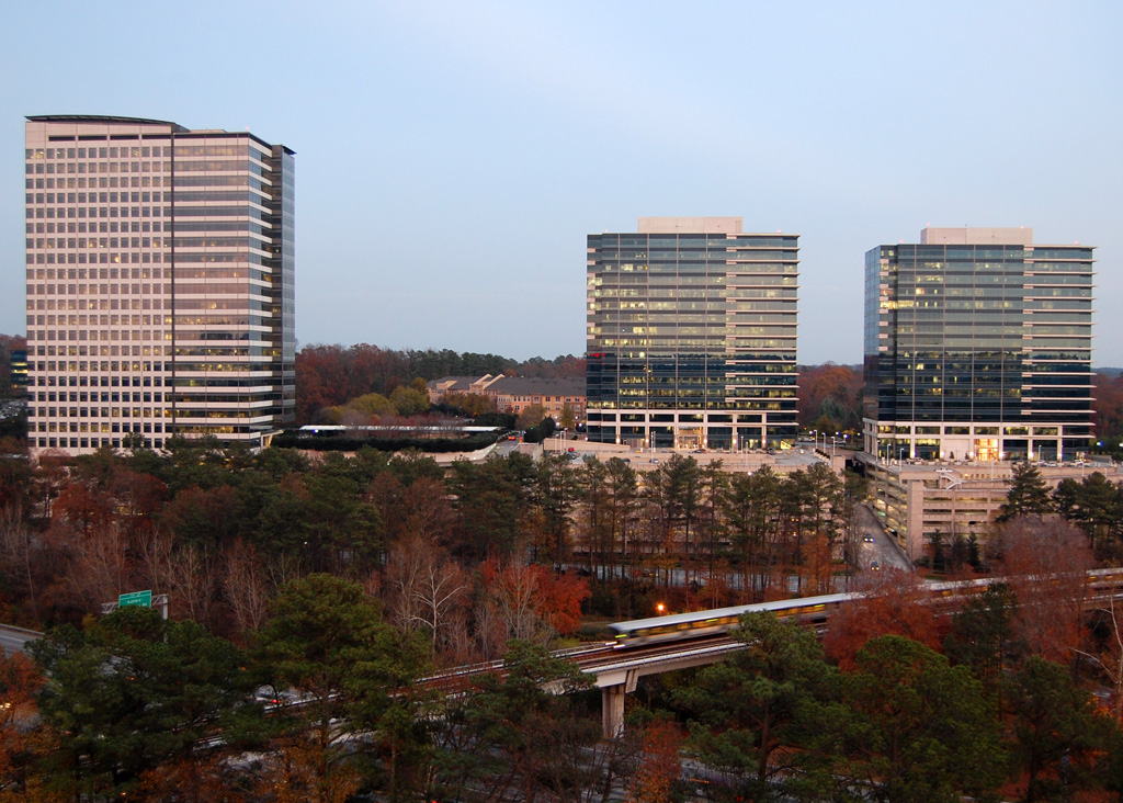 Skyscrapers in Brookhaven, Perimeter Center